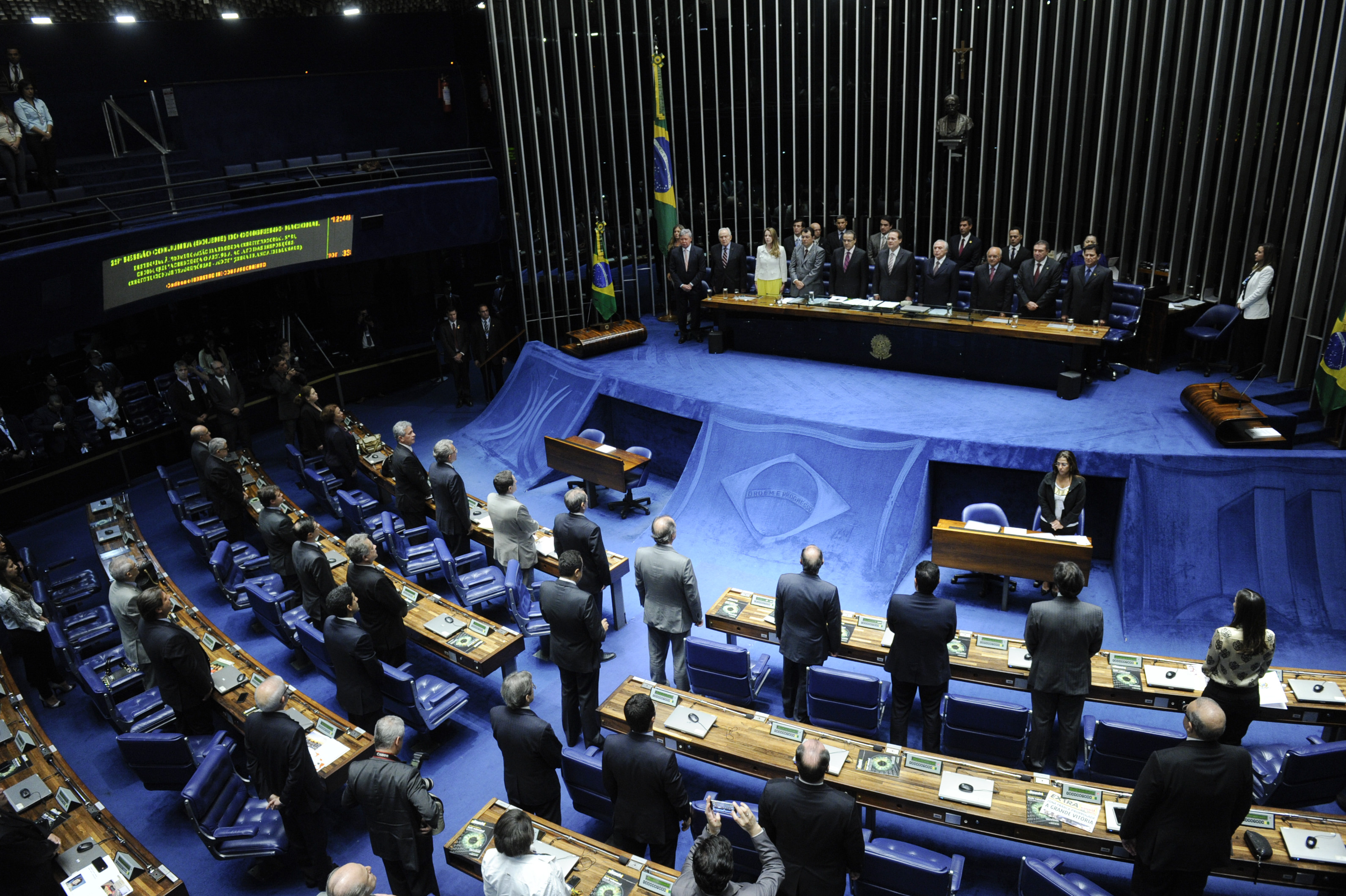 Geral do plenário do Senado Federal durante sessão solene para promulgação da Emenda Constitucional 83, que prorroga até 2073 os benefícios tributários da Zona Franca de Manaus. Mesa (E/D): prefeito de Manaus, Arthur Virgílio; relator geral da Constituição de 1988, Bernardo Cabral (PMDB-AM); senadora Vanessa Grazziotin (PCdoB-AM); relator da proposta no Senado Federal, senador Eduardo Braga (PMDB-AM); presidente da Câmara dos Deputados, Henrique Eduardo Alves (PMDB-RN); presidente do Senado Federal, senador Renan Calheiros (PMDB-AL); vice-presidente da República, Michel Temer (PMDB-SP); governador de Amazonas, José de Melo de Oliveira; relator da proposta pela Câmara dos Deputados, deputado federal Átila Lins (PSD-AM); senador Alfredo Nascimento (PR-AM) Foto: Marcos Oliveira/Agência Senado